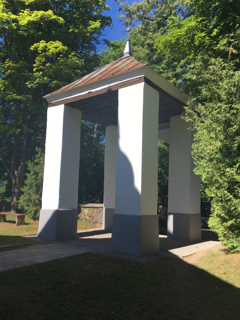 Palėvenėlės bažnyčia